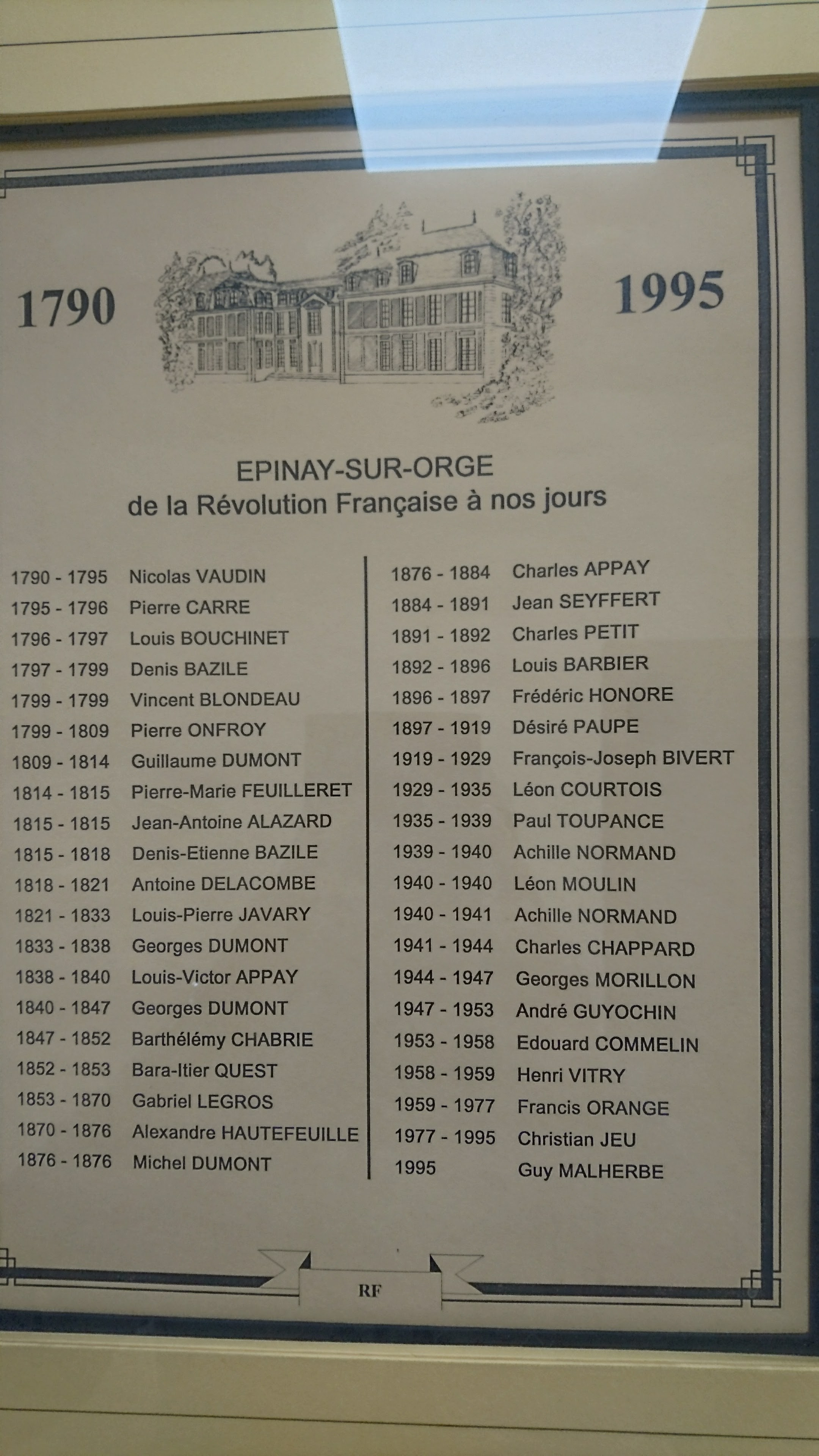 Photo liste des maires d’epinay Sur orge